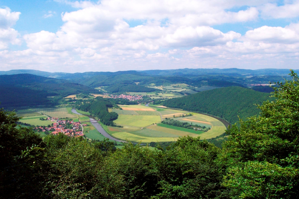 Werraschleife, Landesgrenze Thüringen/Hessen, Deutschland. Blick von Thüringen nach Westen in Richtung Hessen. Links der Ort Lindewerra, rechts im Hintergrund Oberrieden (Bad Sooden-Allendorf).